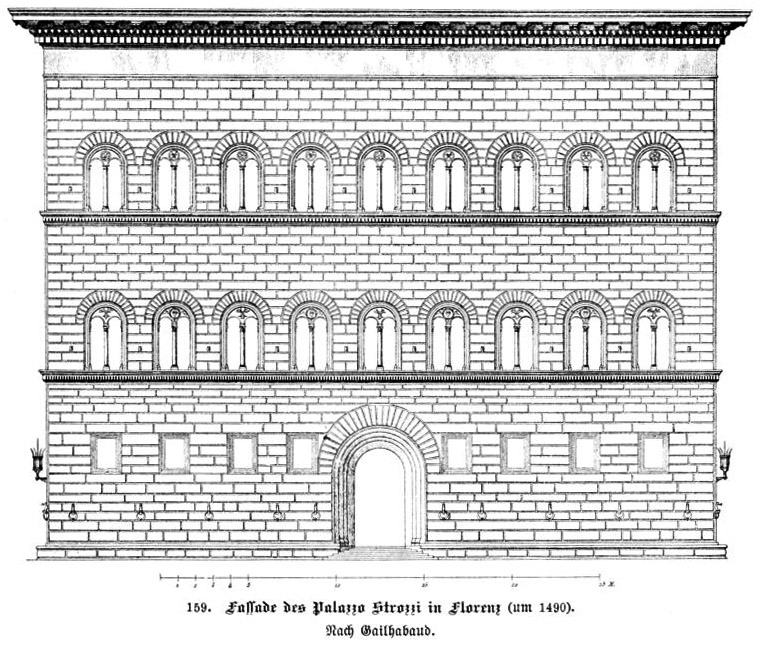 Palazzo Strozzi in Florenz. Quelle: Buch der Erfindungen, Gewerbe und Industrien, 1896. Public Domain